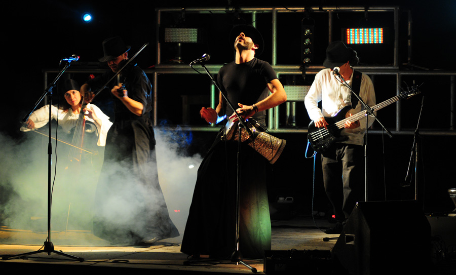 banda